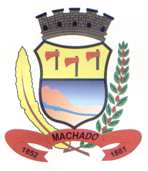 Brasão da cidade de Machado, Minas Gerais.